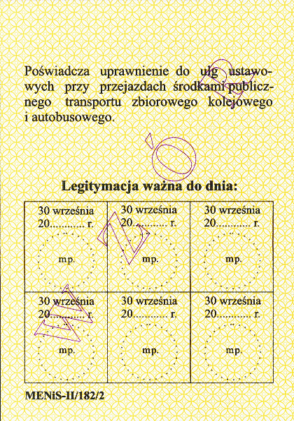 Wzór tylnej strony legitymacji szkolnej dla ucznia niepełnosprawnego - wzór MENiS-II/182/2 obowiązujący od 2007